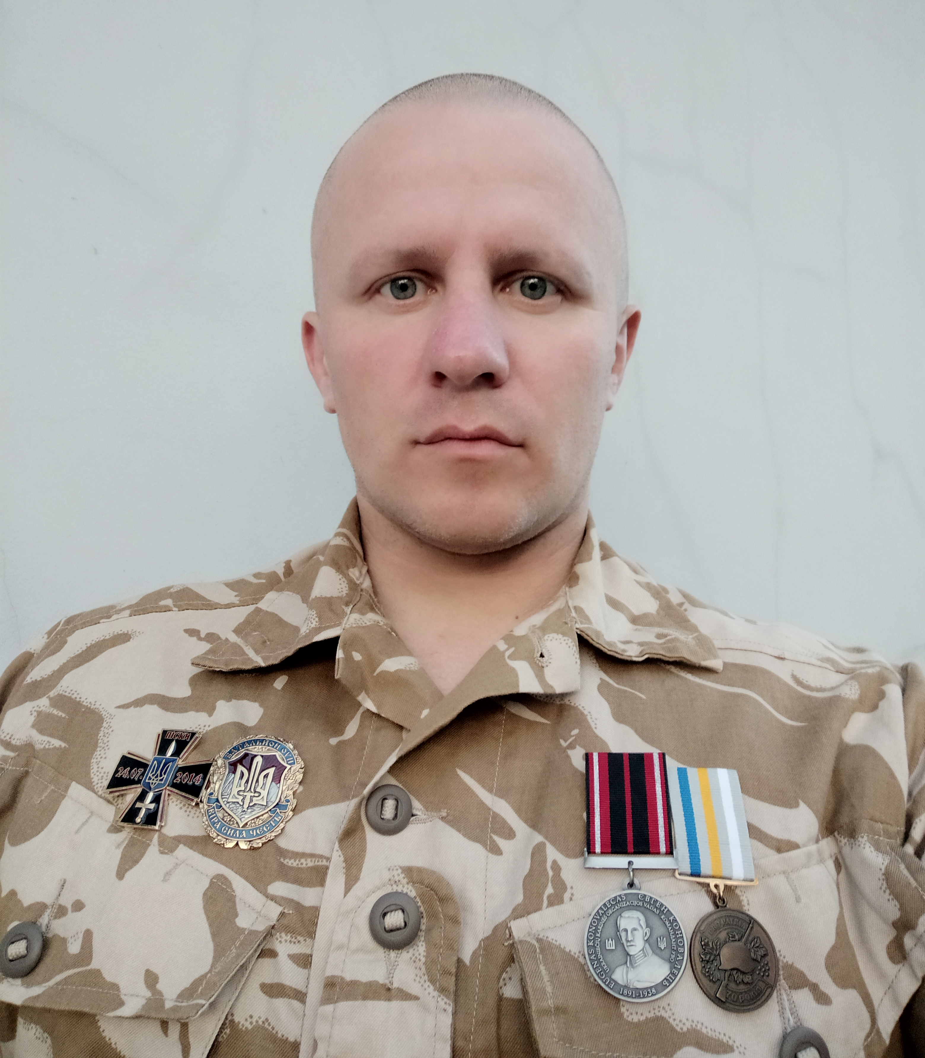 Vladyslav Popovych. OUN.